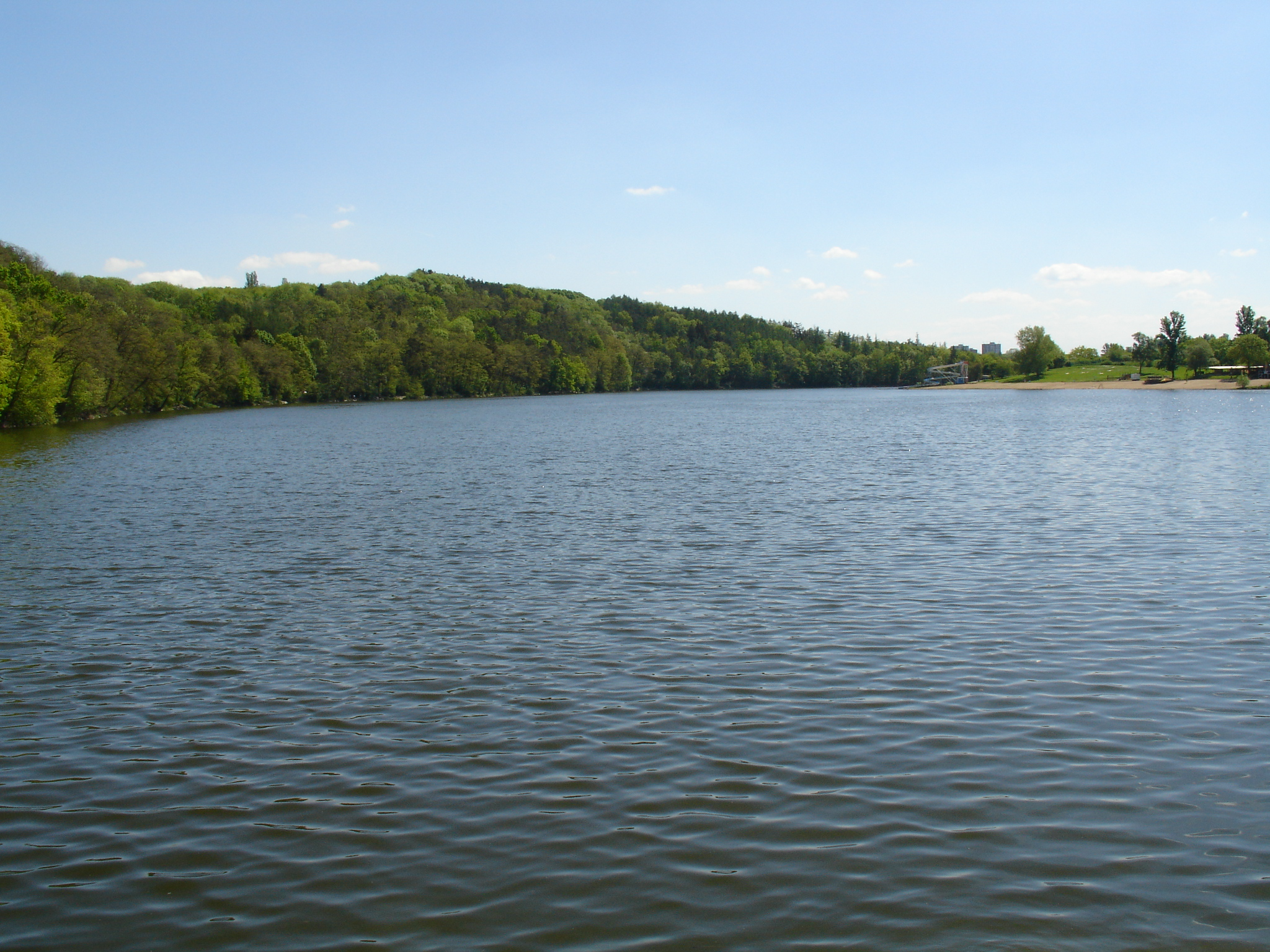 Hostivařská nádrž